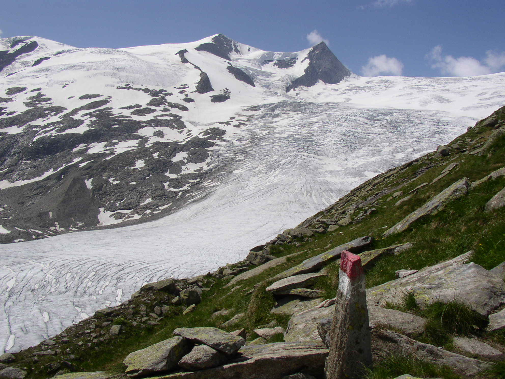 Schlatenkees